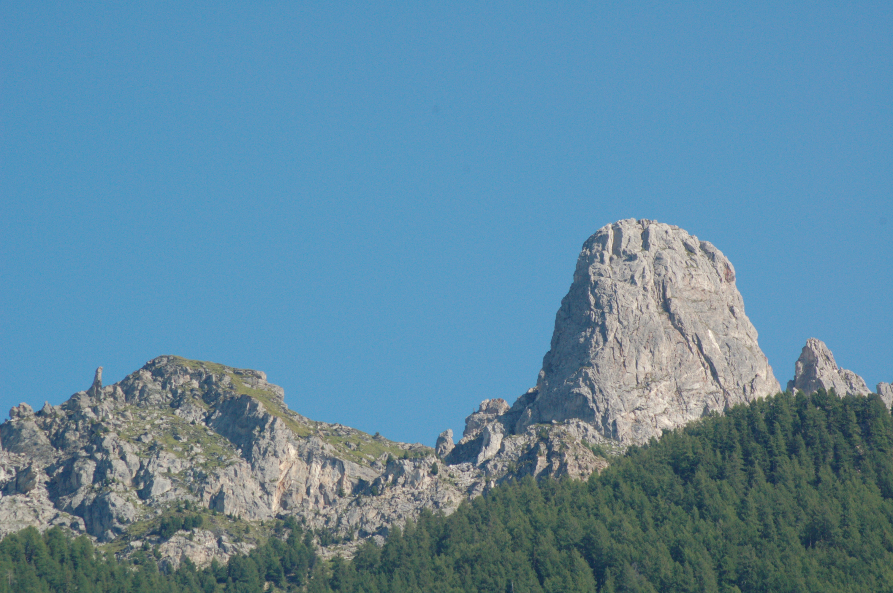 Pierre Avoi von Sapinhaut aus gesehen